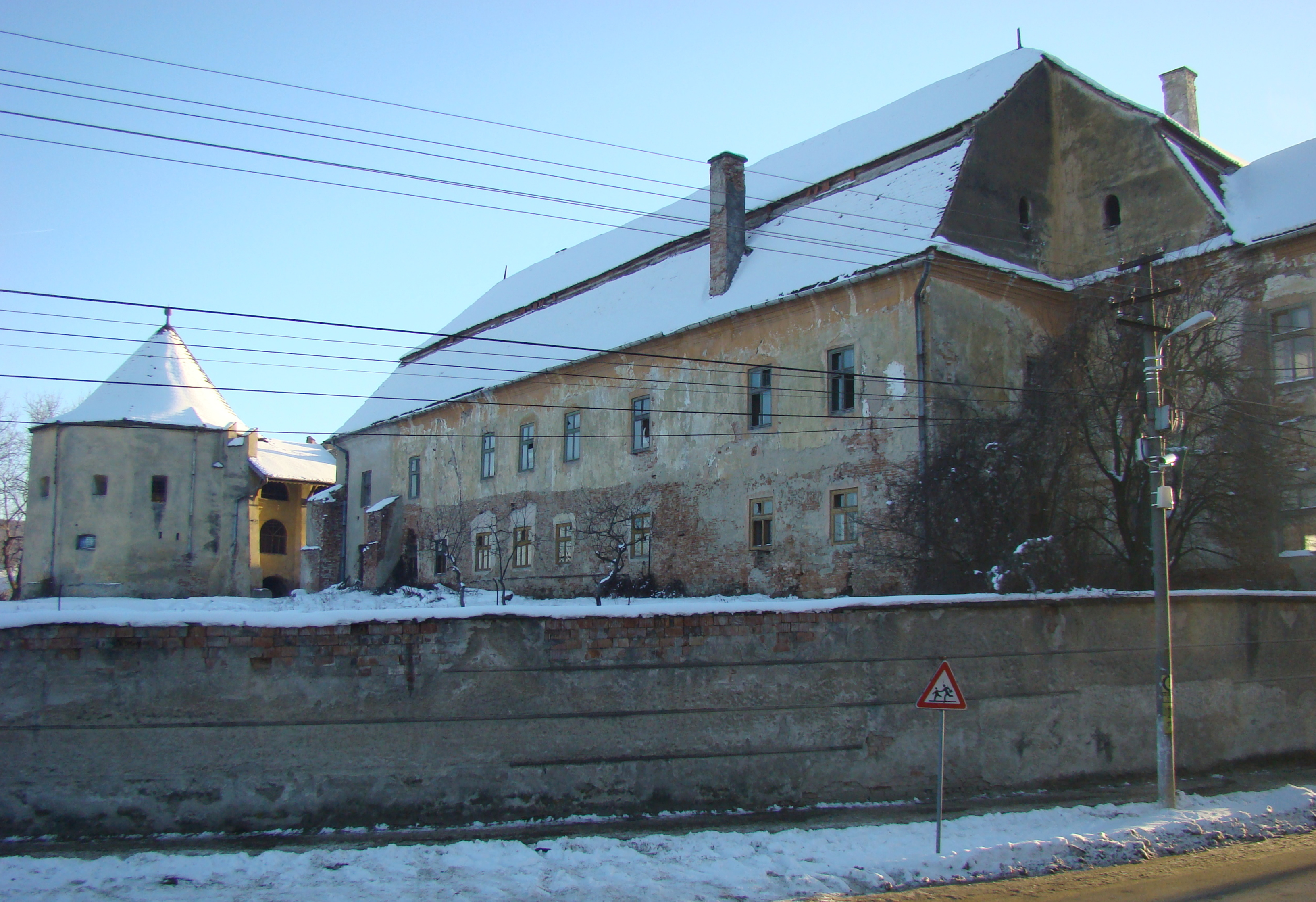 Castelul Apaffy, oraș Dumbrăveni, județul Sibiu